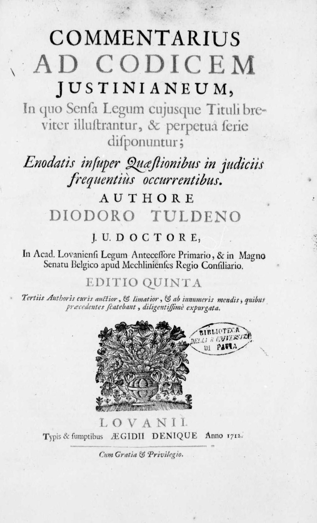 Frontespizio